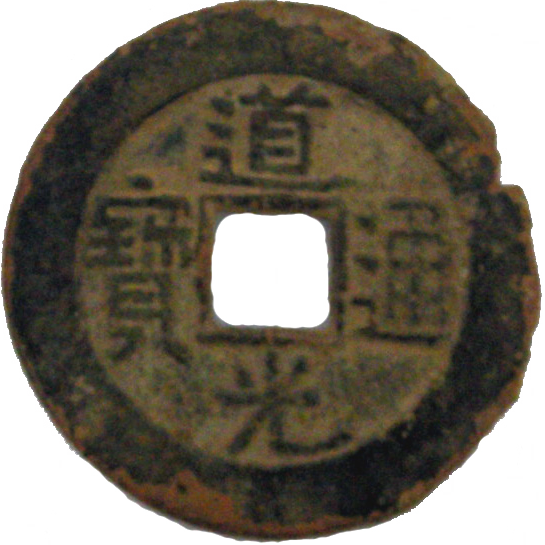 道光通宝小平钱，直径23.6 mm，厚1.4 mm，重3.6 g。